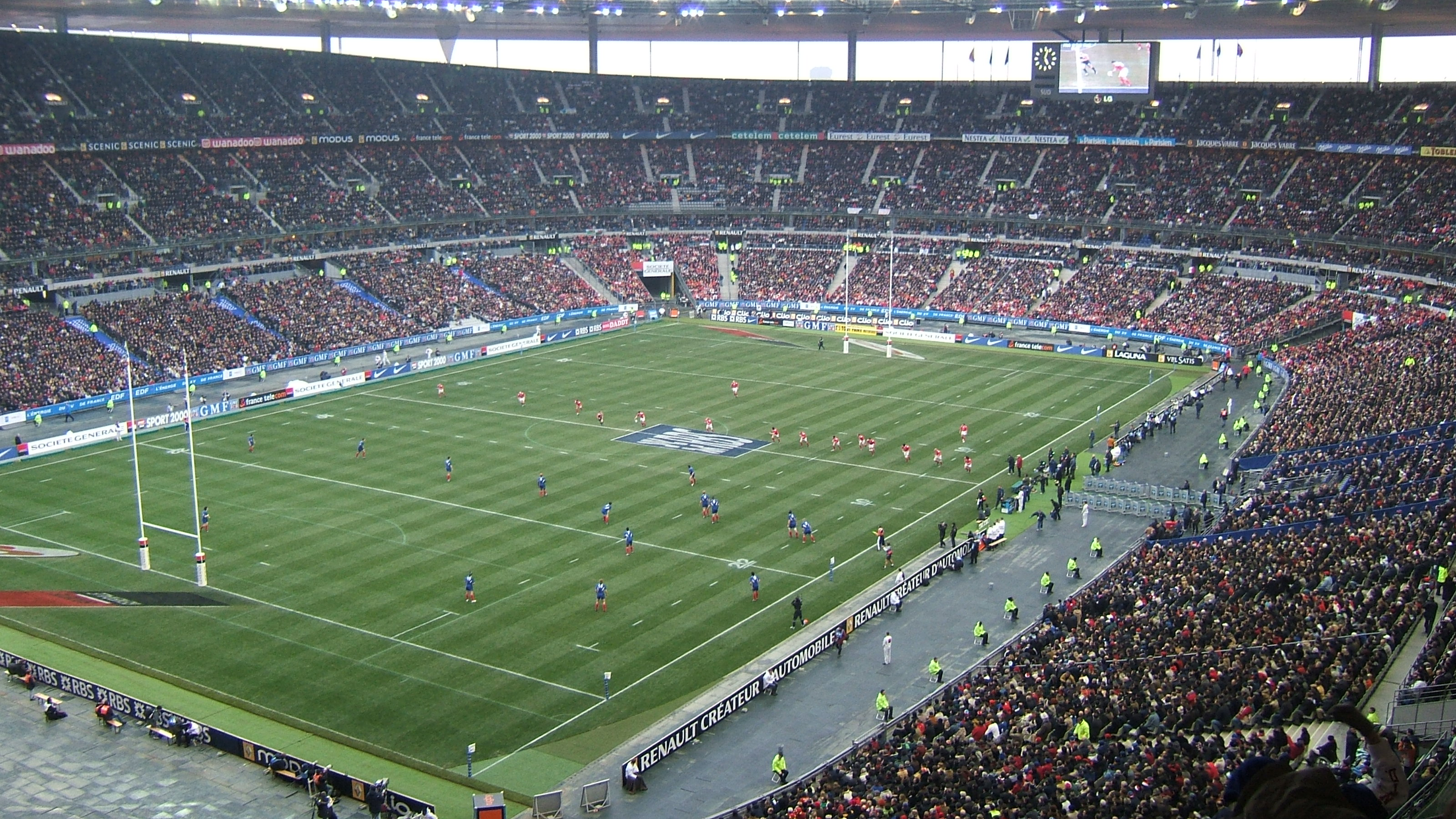 Coup d'envoi du match du Tournoi des Six Nations entre la France et le pays de Galles.